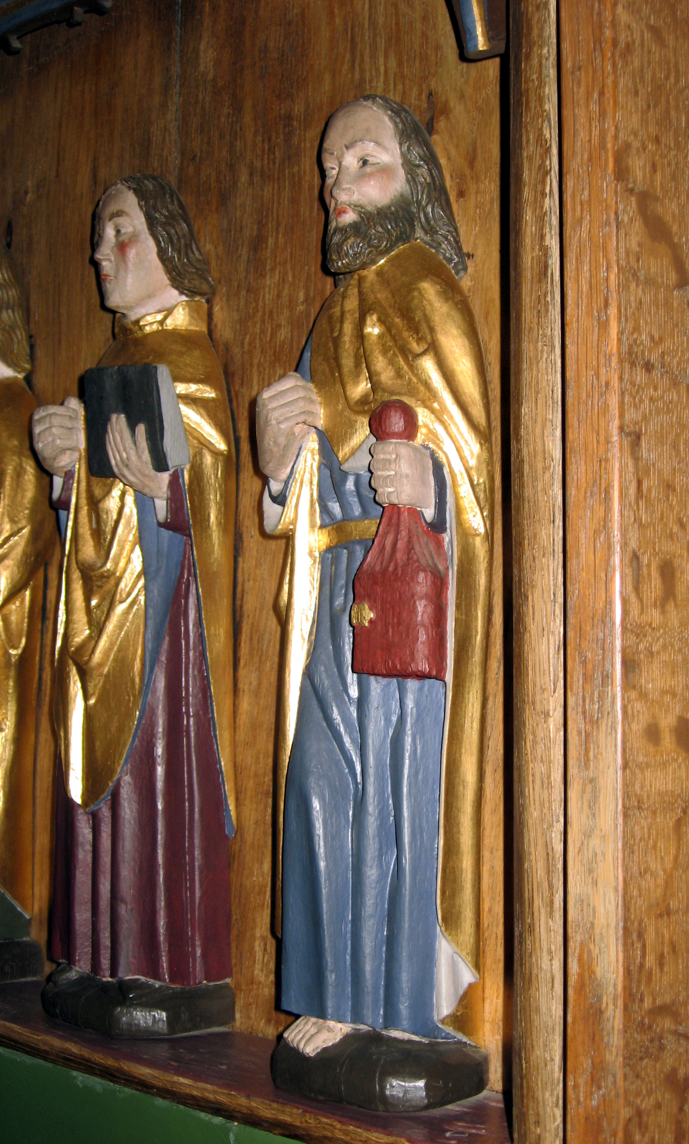 Altar piece from Tranbjerg Kirke in Tranbjerg Sogn, Århus Kommune, Denmark.